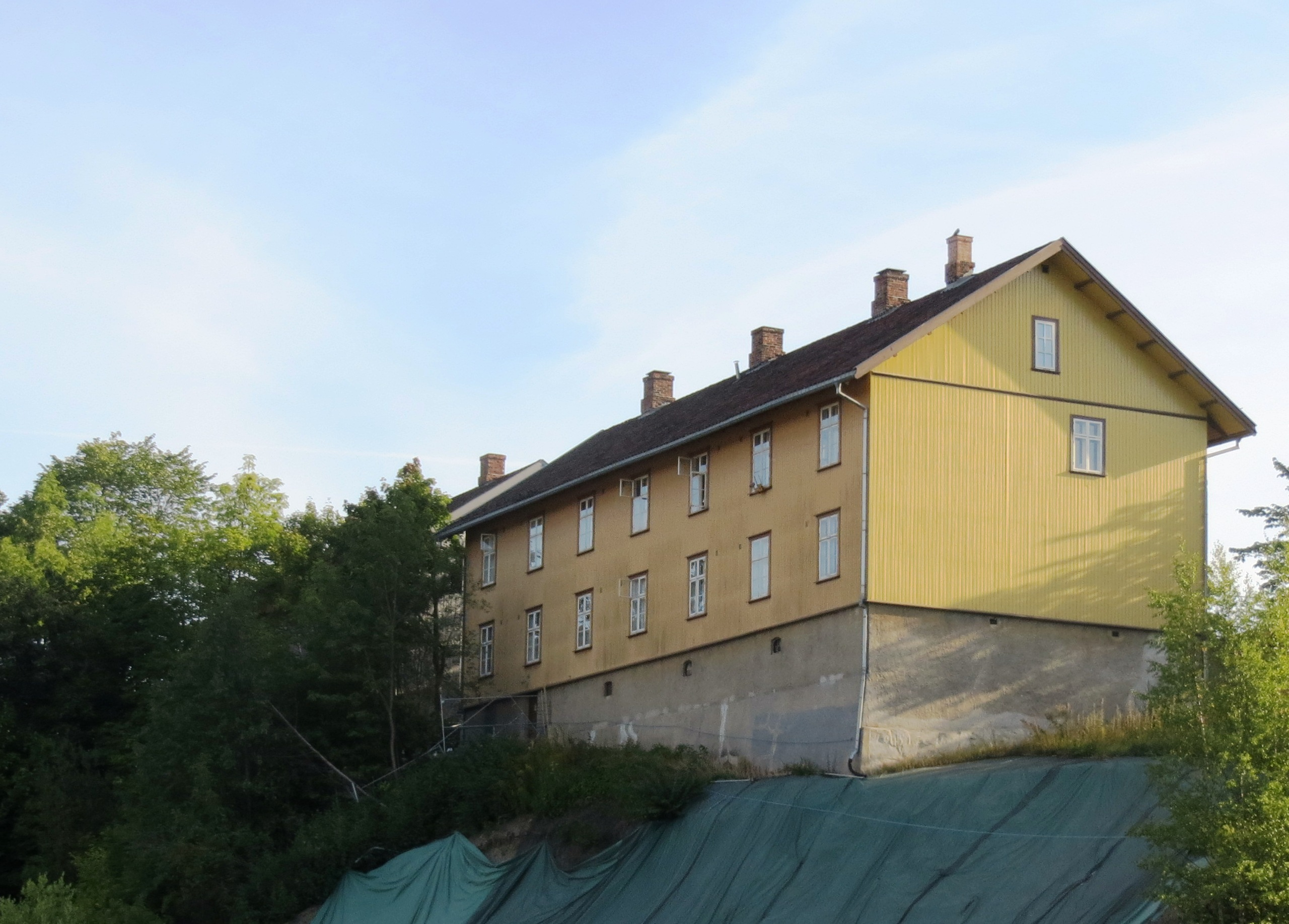 Historic dwelling at Lilleaker, Oslo